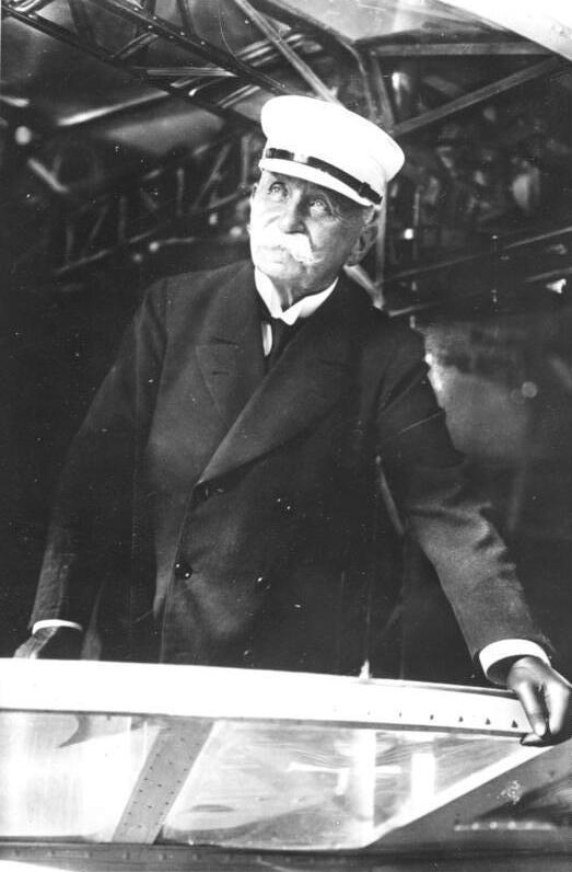 Zum 100. Geburtstage des Grafen Zeppelin am 8.7.38 U.B.: Graf Zeppelin in der Führergondel seines Luftschiffes. 4.7.38 Archivaufnahme